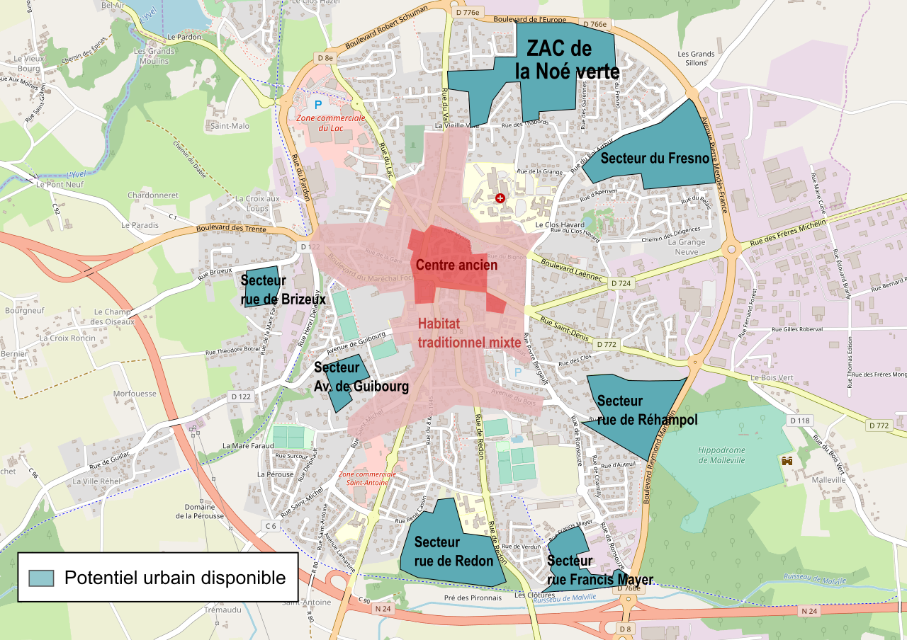 Carte de l'organisation urbaine de la commune de Ploërmel (France).